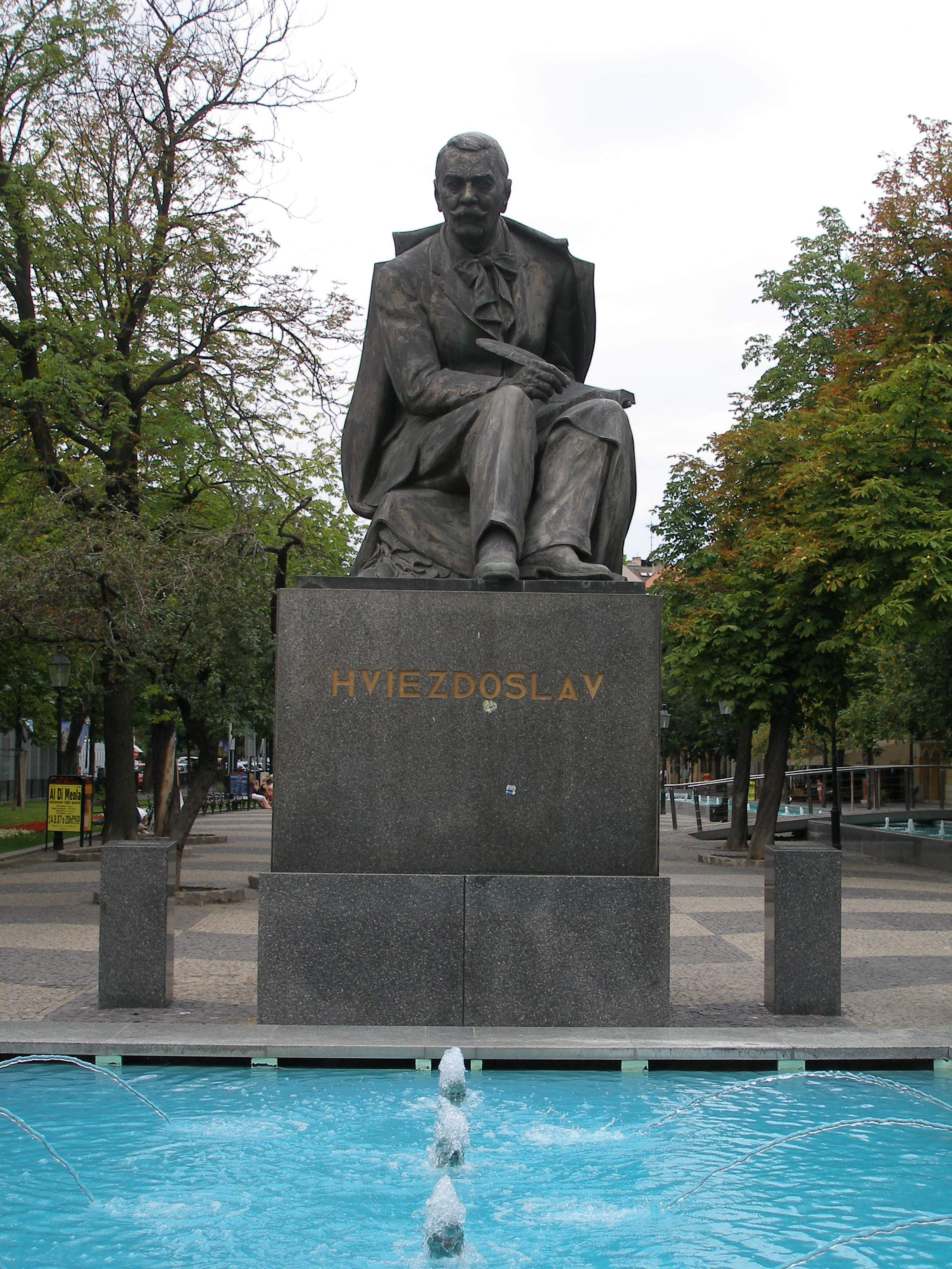 Fontána na Hviezdoslavovom námestí. Bronzová skulptúra poéta Pavla Orságha Hviezdoslava, ktorej autormi sú V. Ihriský a J. Pospíšil. Rok jej zhotovenia je 1938. Pomník spisovateľa Pavla Országha Hviezdoslava je na Hviezdoslavovom námestí od roku 1938. Až do 50. rokov stál pred divadlom.